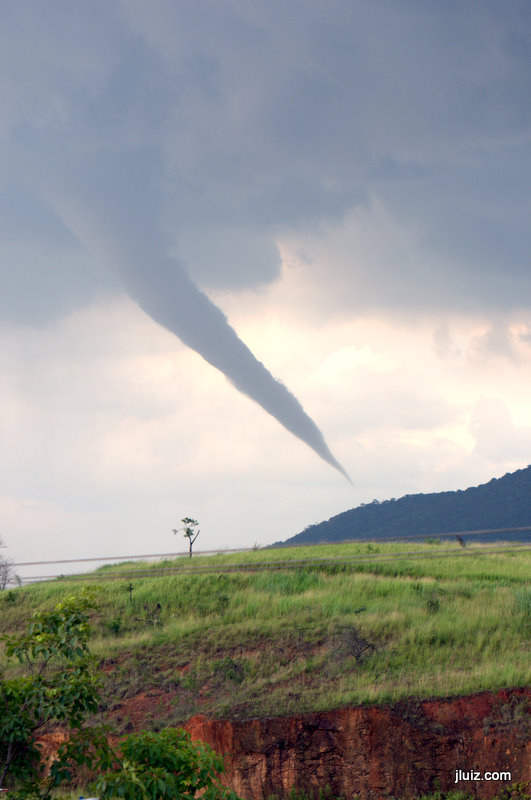 Tornado nova iguaçu,rj 2011 bem atrás da montanha e apontando para o vortex dele que está nos bairros.